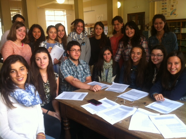 Grupo de jóvenes estudiantes del instituto Alfonso II de Oviedo (España) prepara su trabajo sobre Wikipedia.